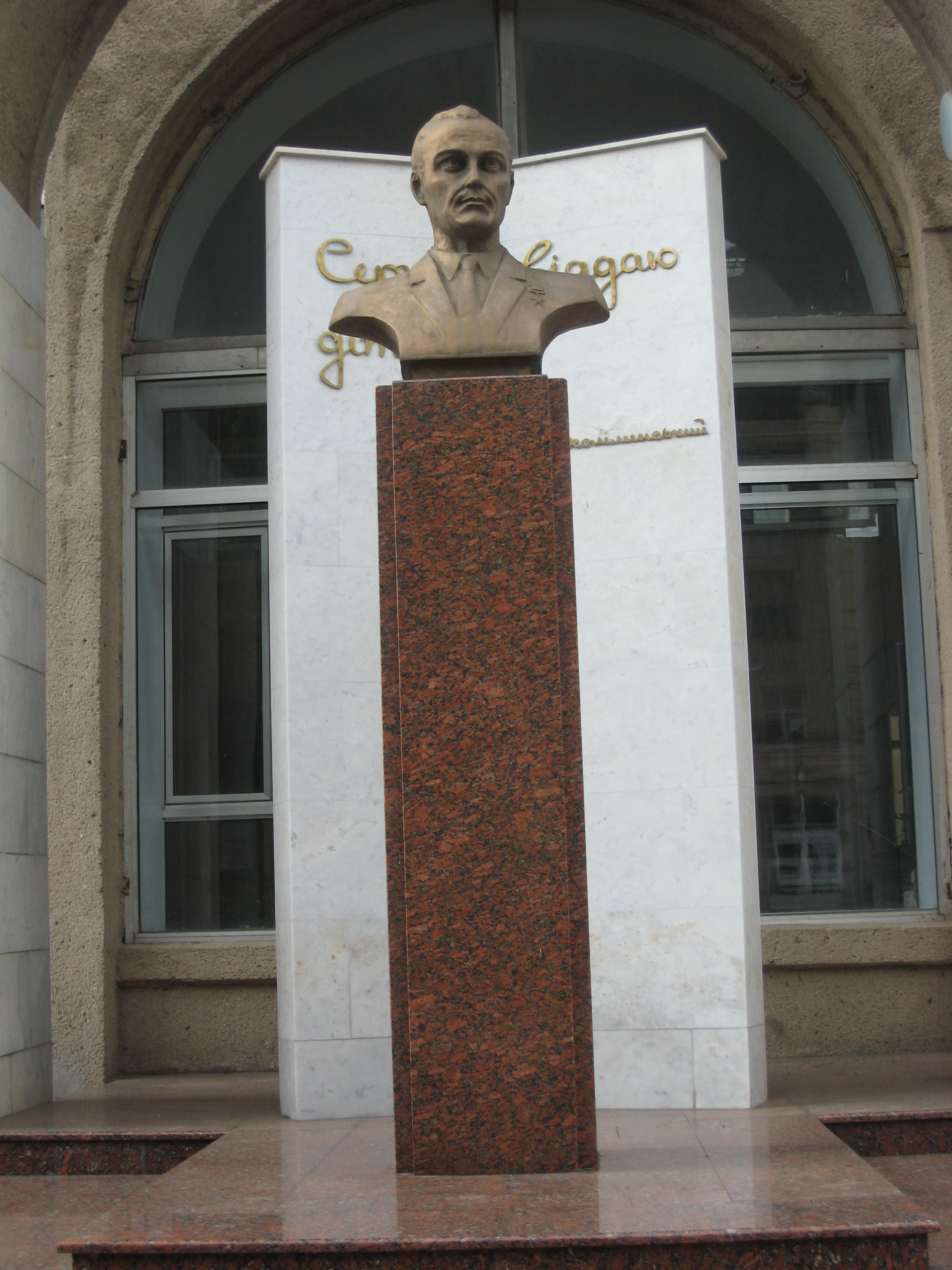 Памятник Сухомлинскому возле входа в Николаевский государственный университет имени В. А. Сухомлинского в Николаеве (Украина).